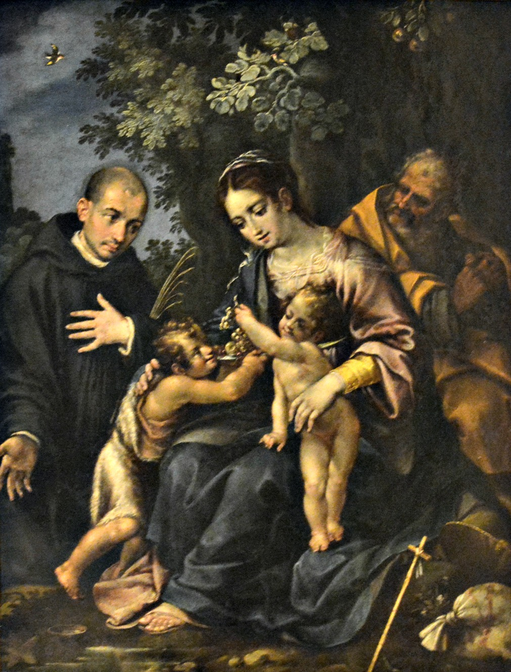 Vedi titolo